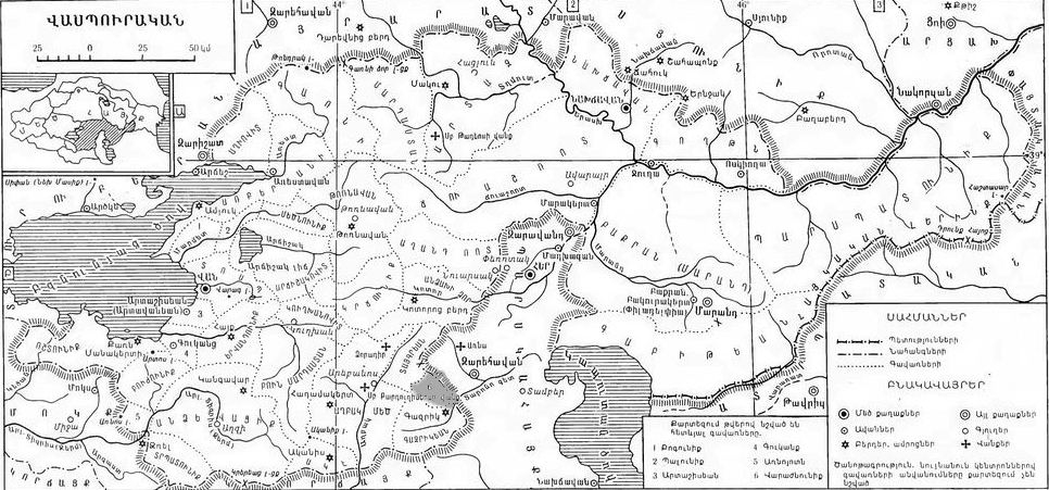 Վասպուրական